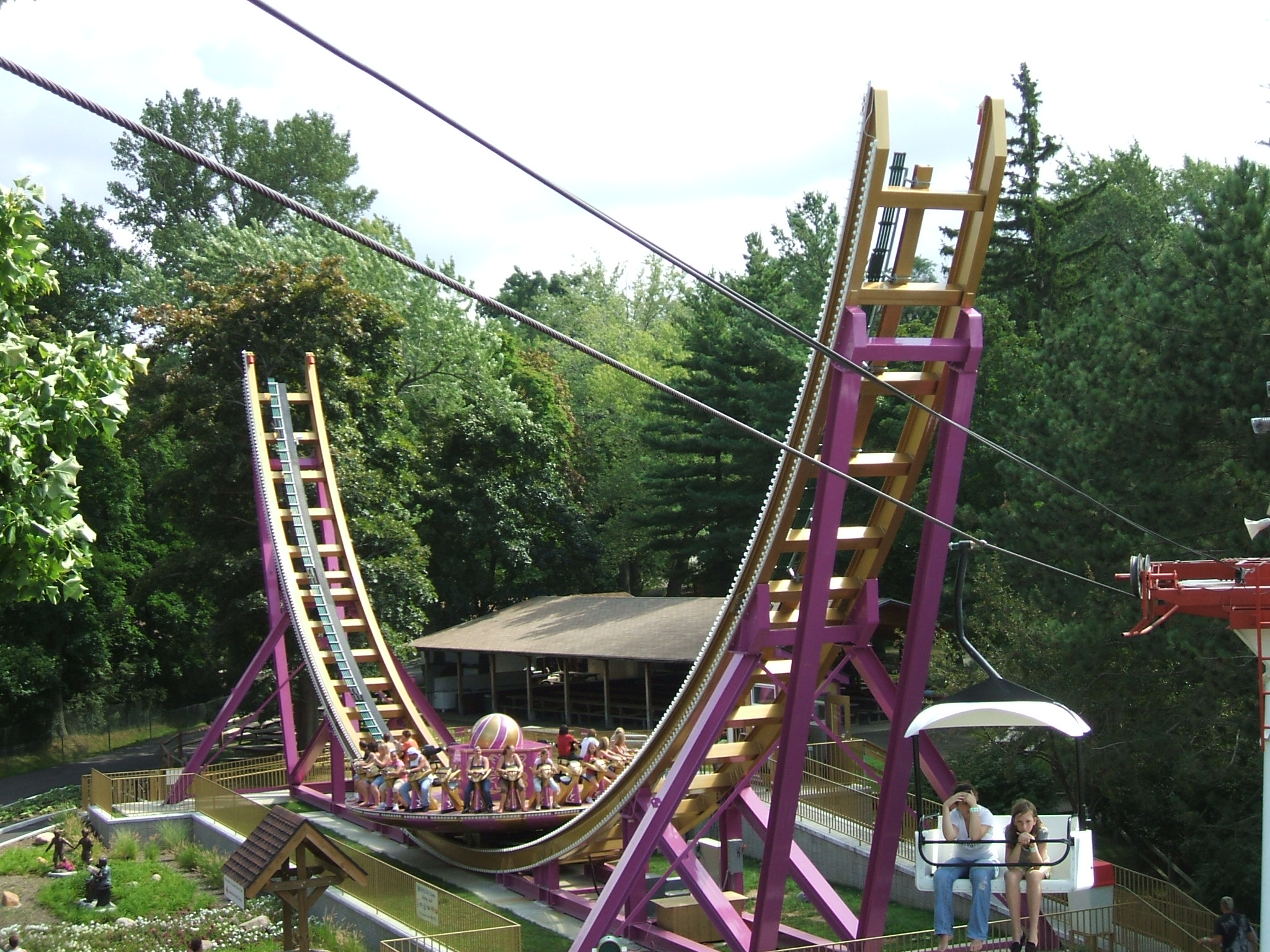 Mega Vortex